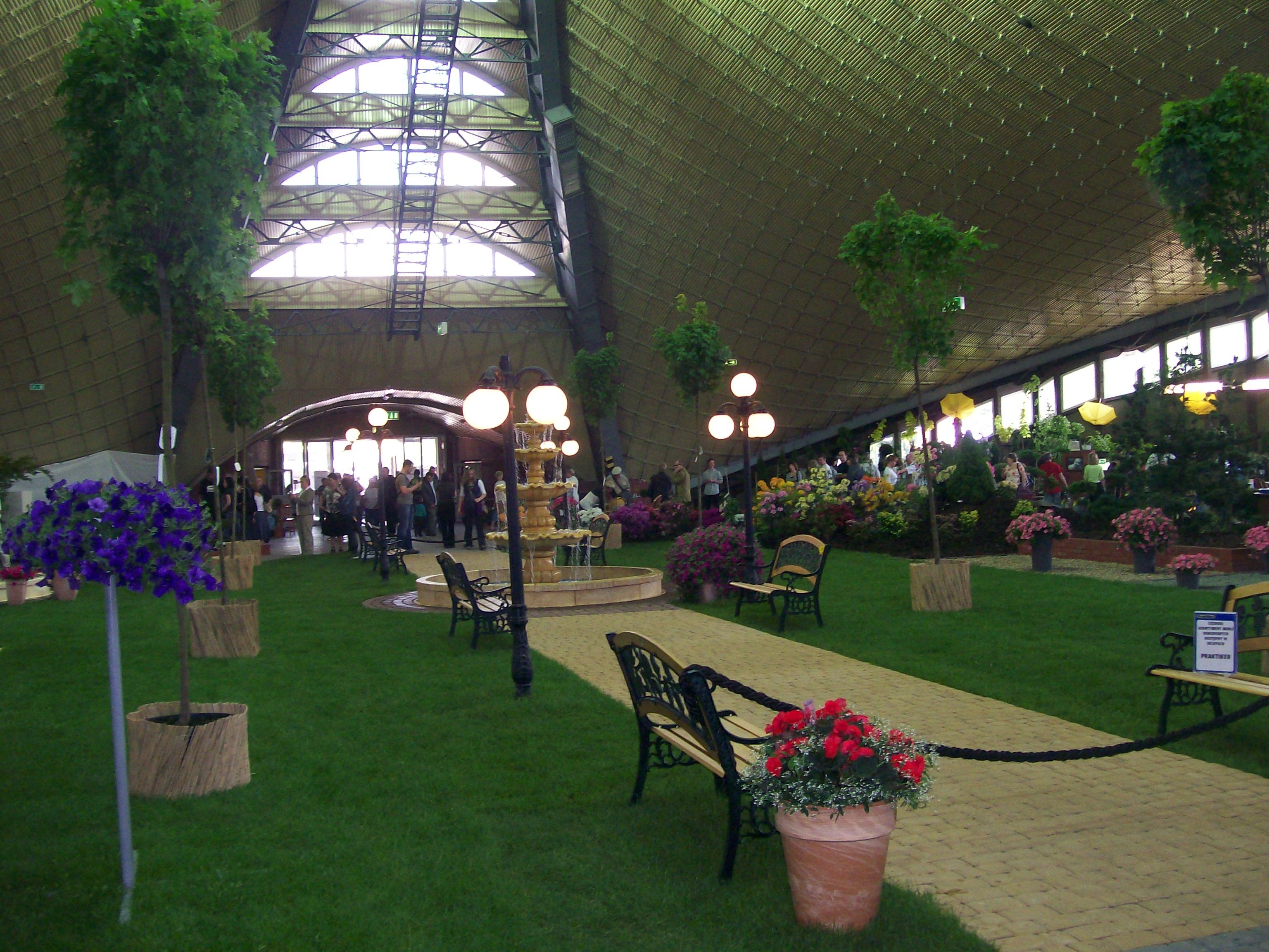 118 Wystawa Kwiatów i Ogrodów w Chorzowie.